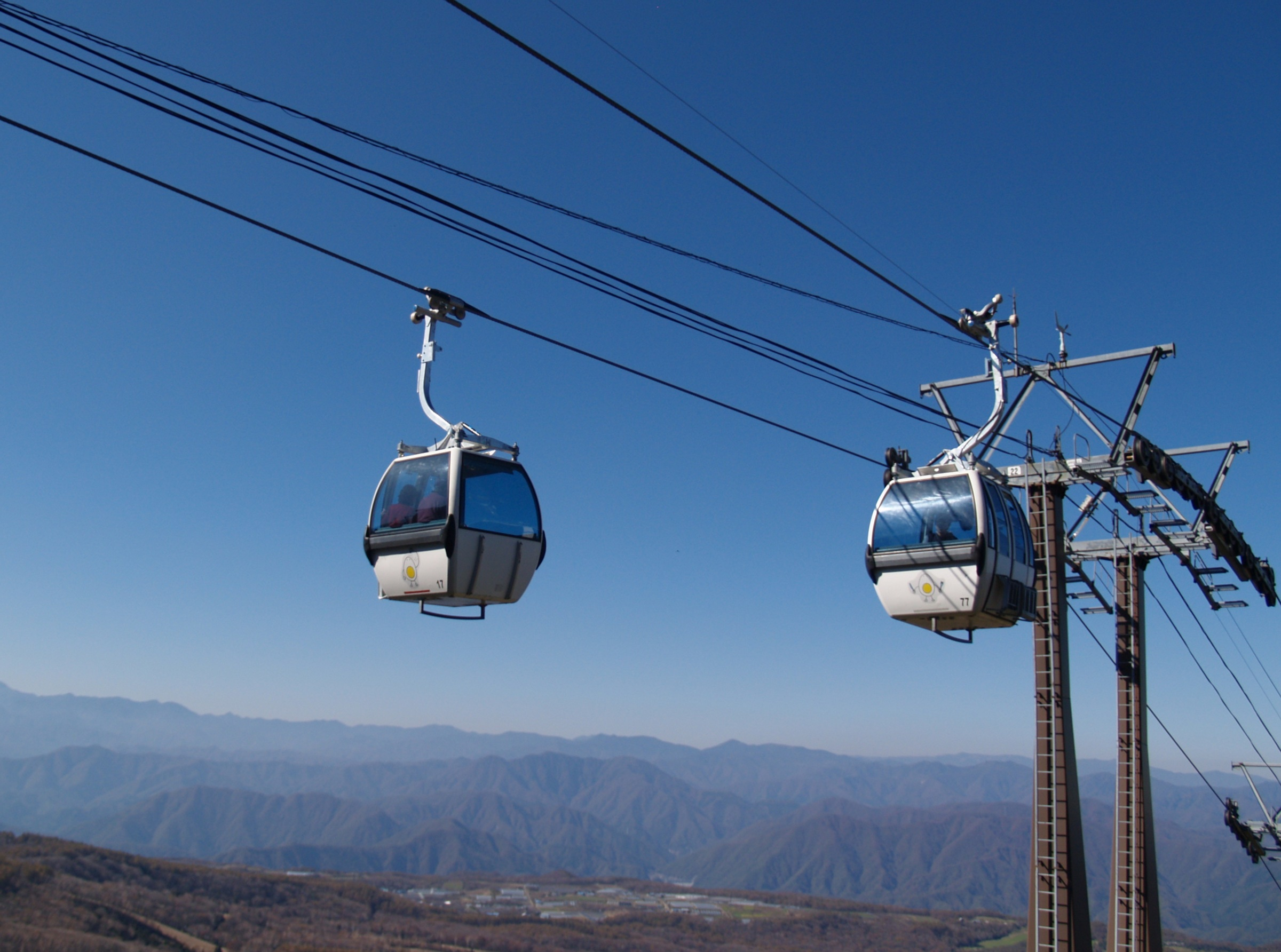 ハンターマウンテン塩原のゴンドラリフト